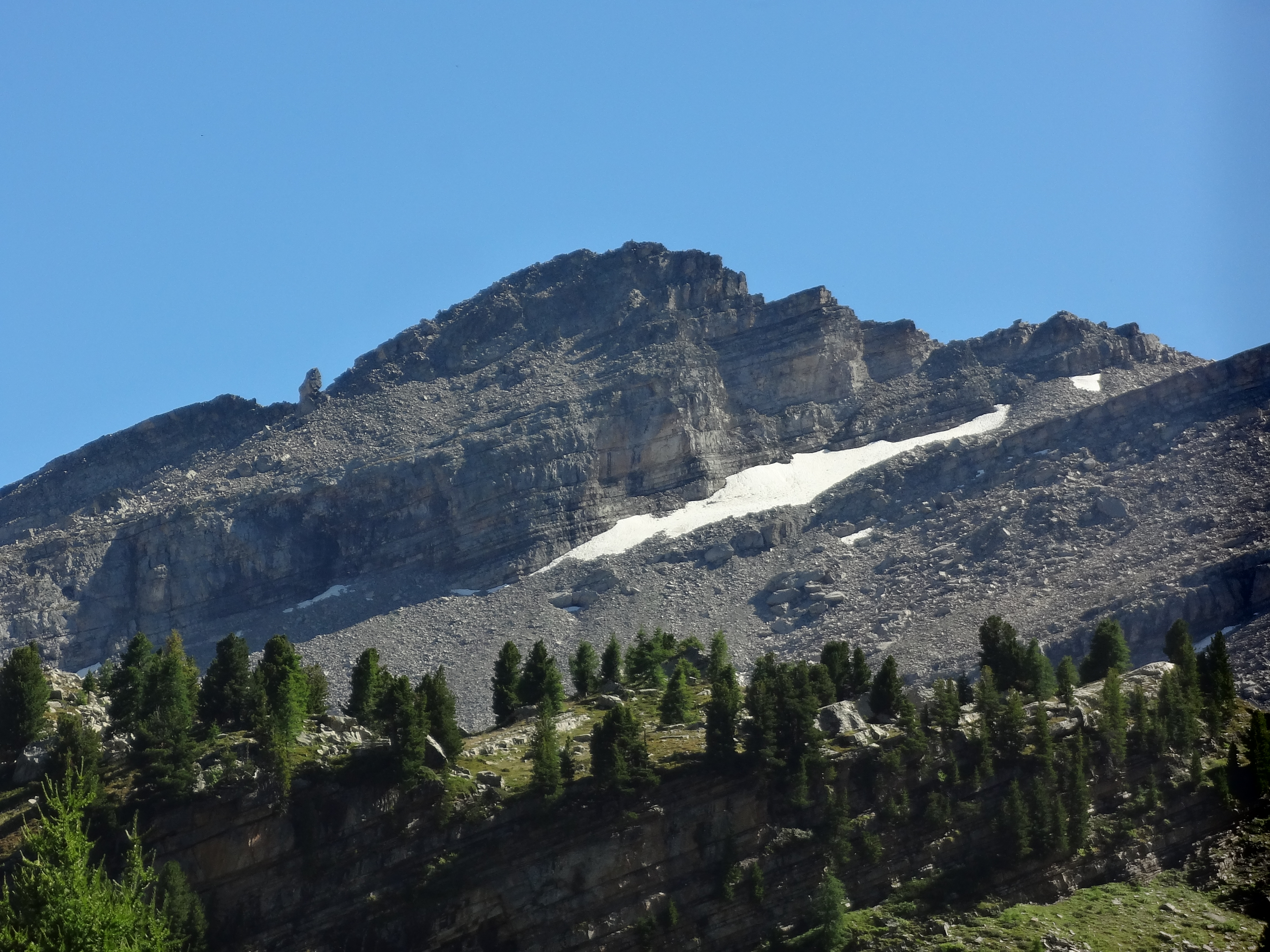 Tête de l'Estrop Nord vu du Nord (2961 m) et glacier de la Blanche